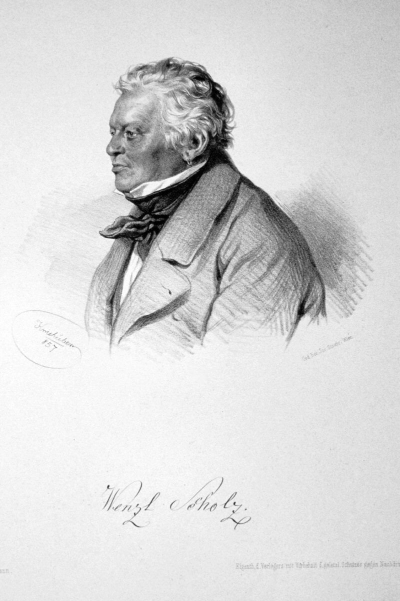 Wenzel Scholz, Lithographie von Josef Kriehuber, 1852